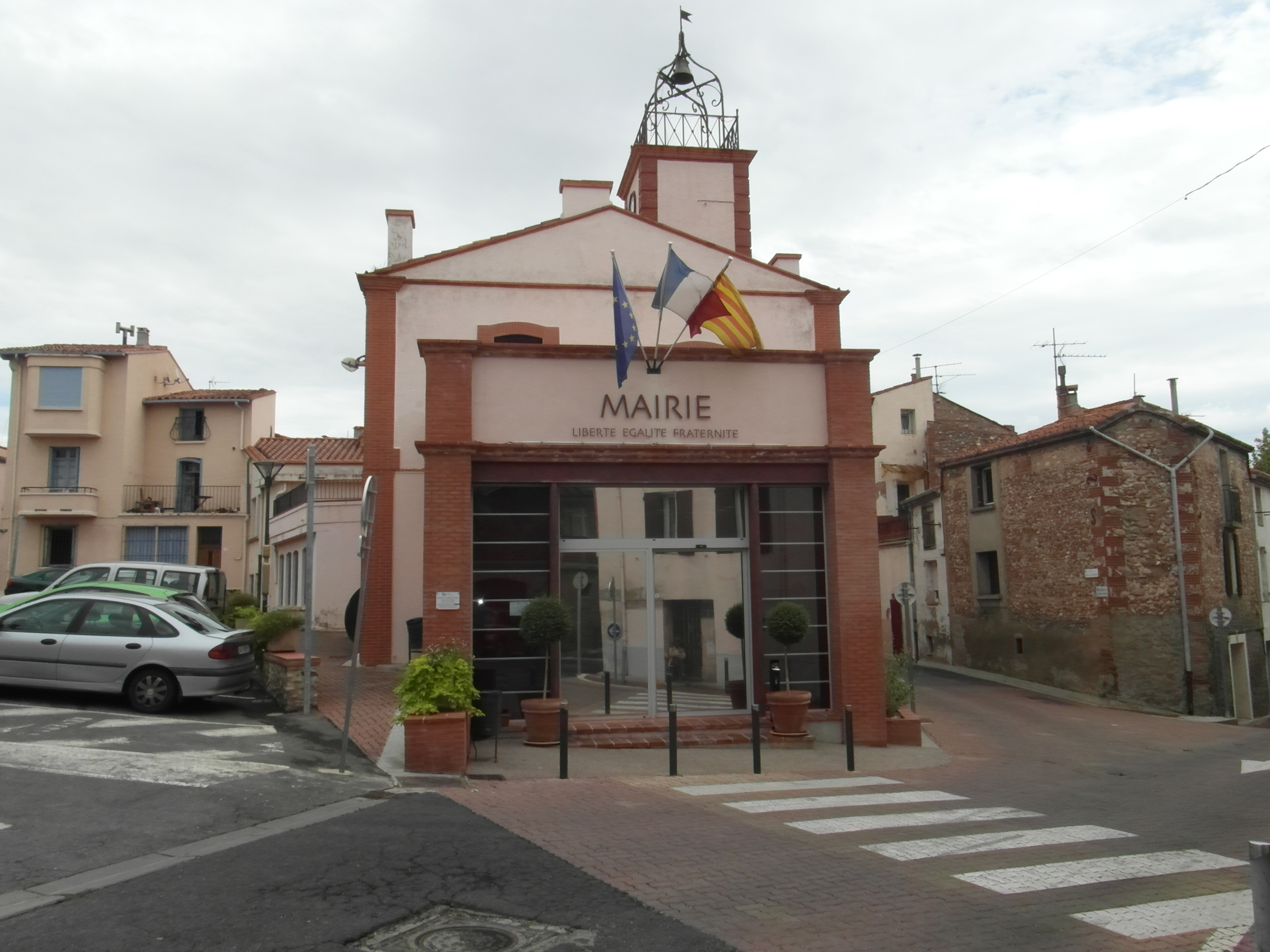 Ancienne mairie de Canohès